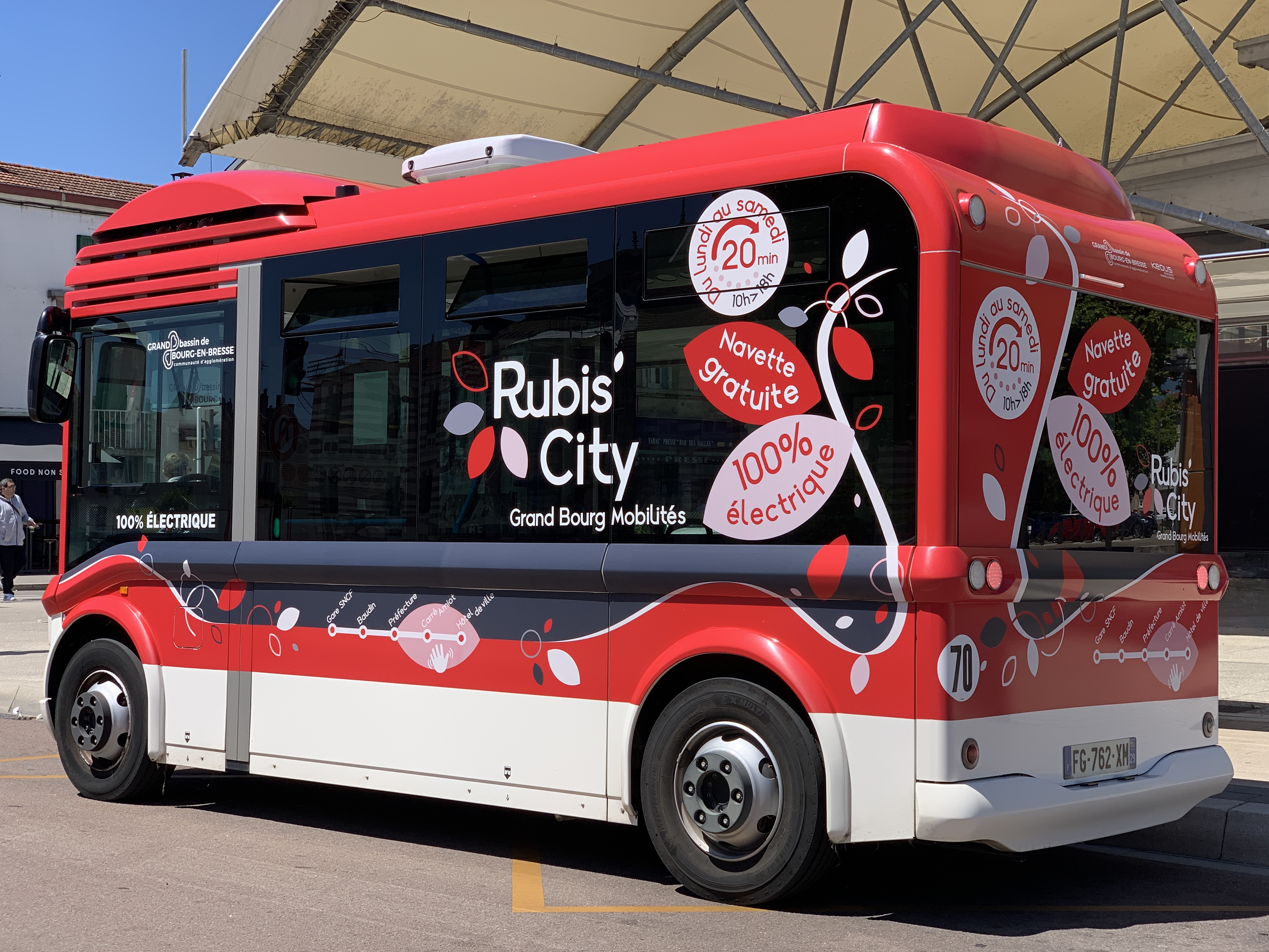 Navette Rubis City au carré Amiot, Bourg-en-Bresse.